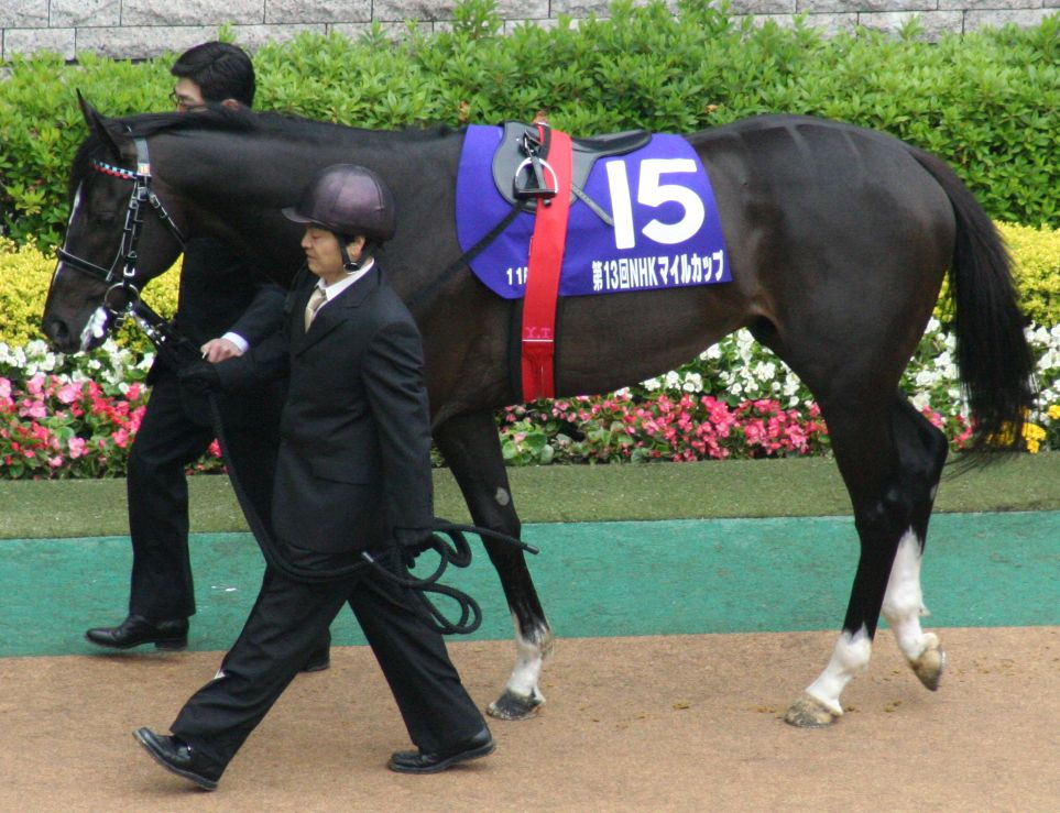 ファリダット（東京競馬場）